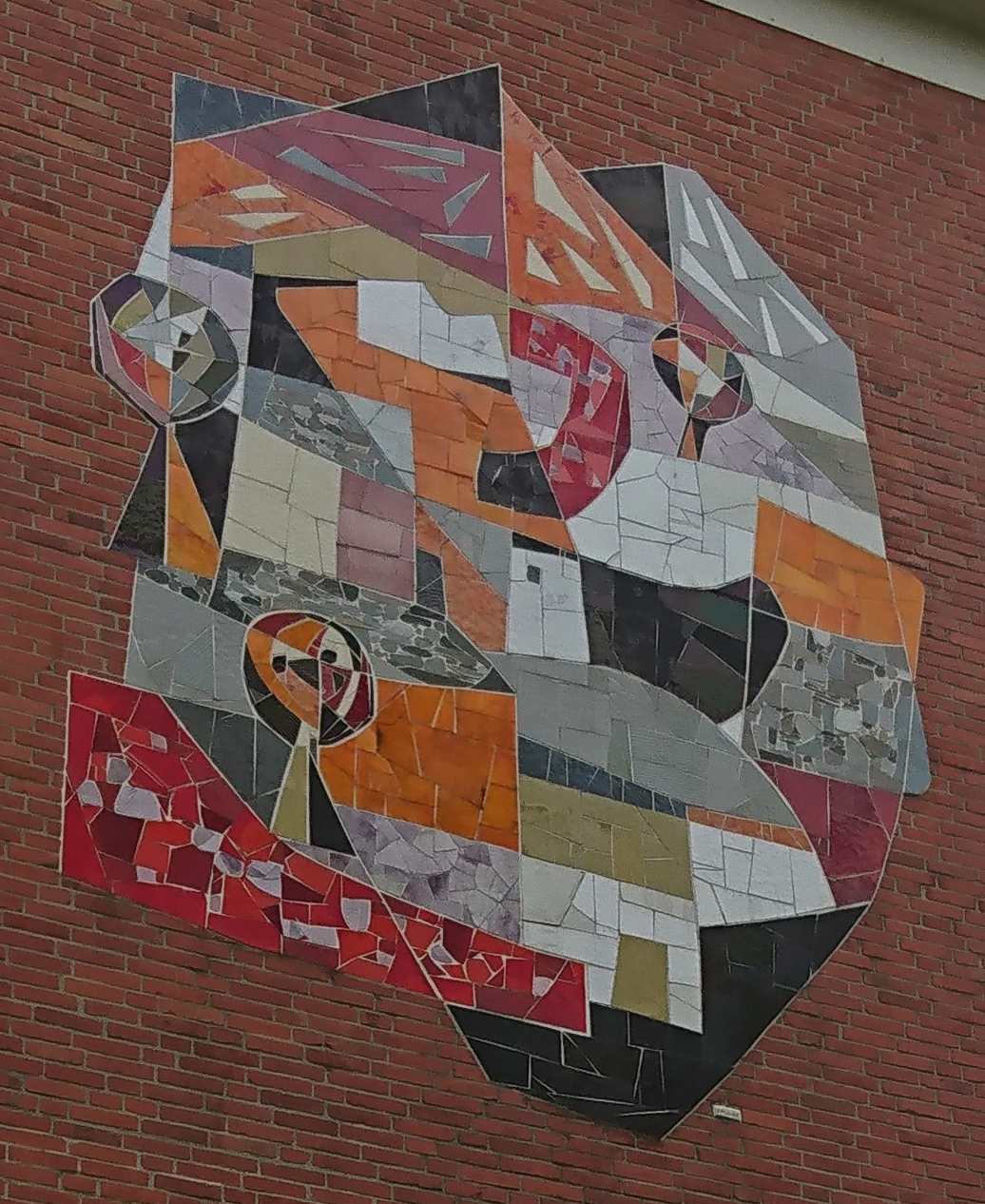 Annette Caspar (1916–2008), später Annelis Caspar-McLean (dann Polly Bracegirdle). Mosaik, 1961, Theodor-Fahr-Straße 47.